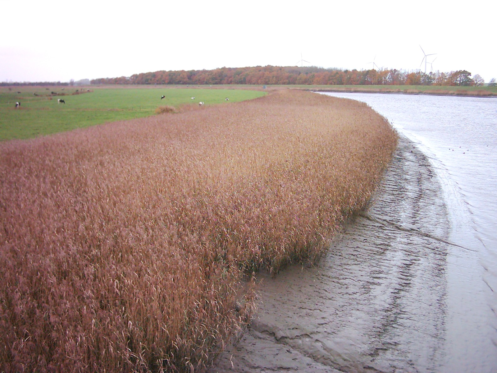 Reet an der Oste bei Geversdorf, Niedersachsen.